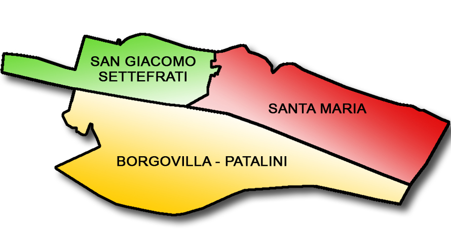 Barletta: Suddivisione amministrativa in quartieri